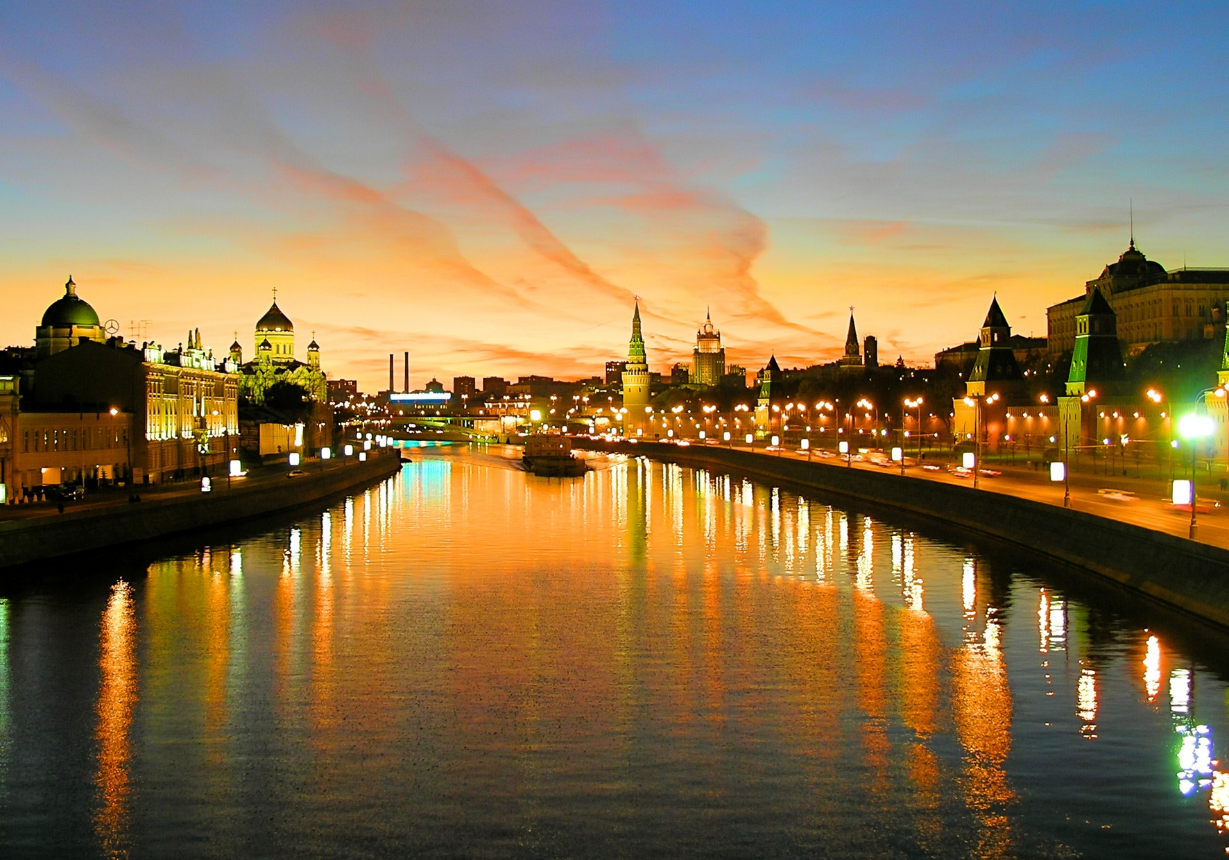 Kremlin at dusk